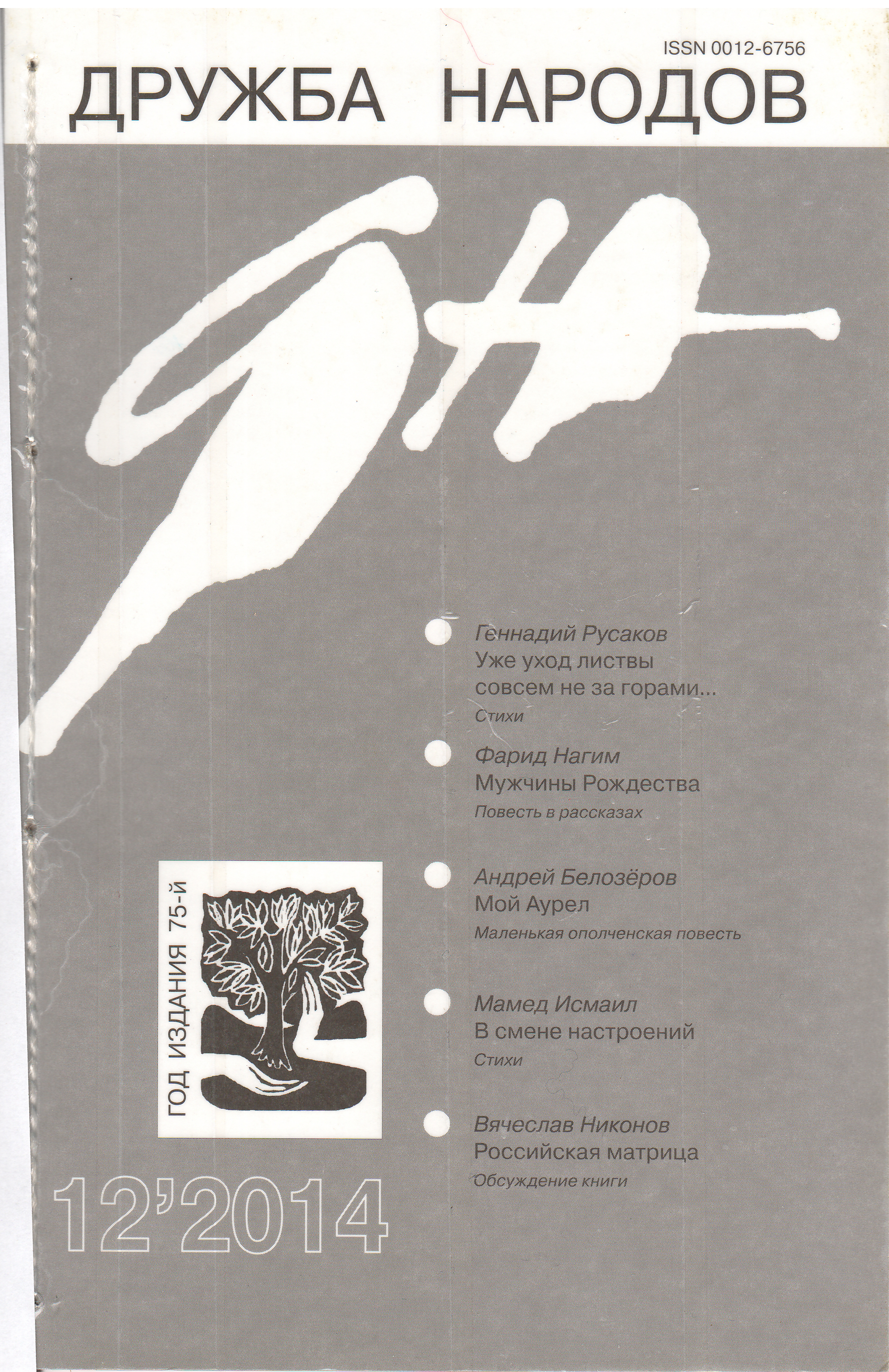 В этом номере журнала была опубликована повесть А. Белозёрова "Мой Аурел"